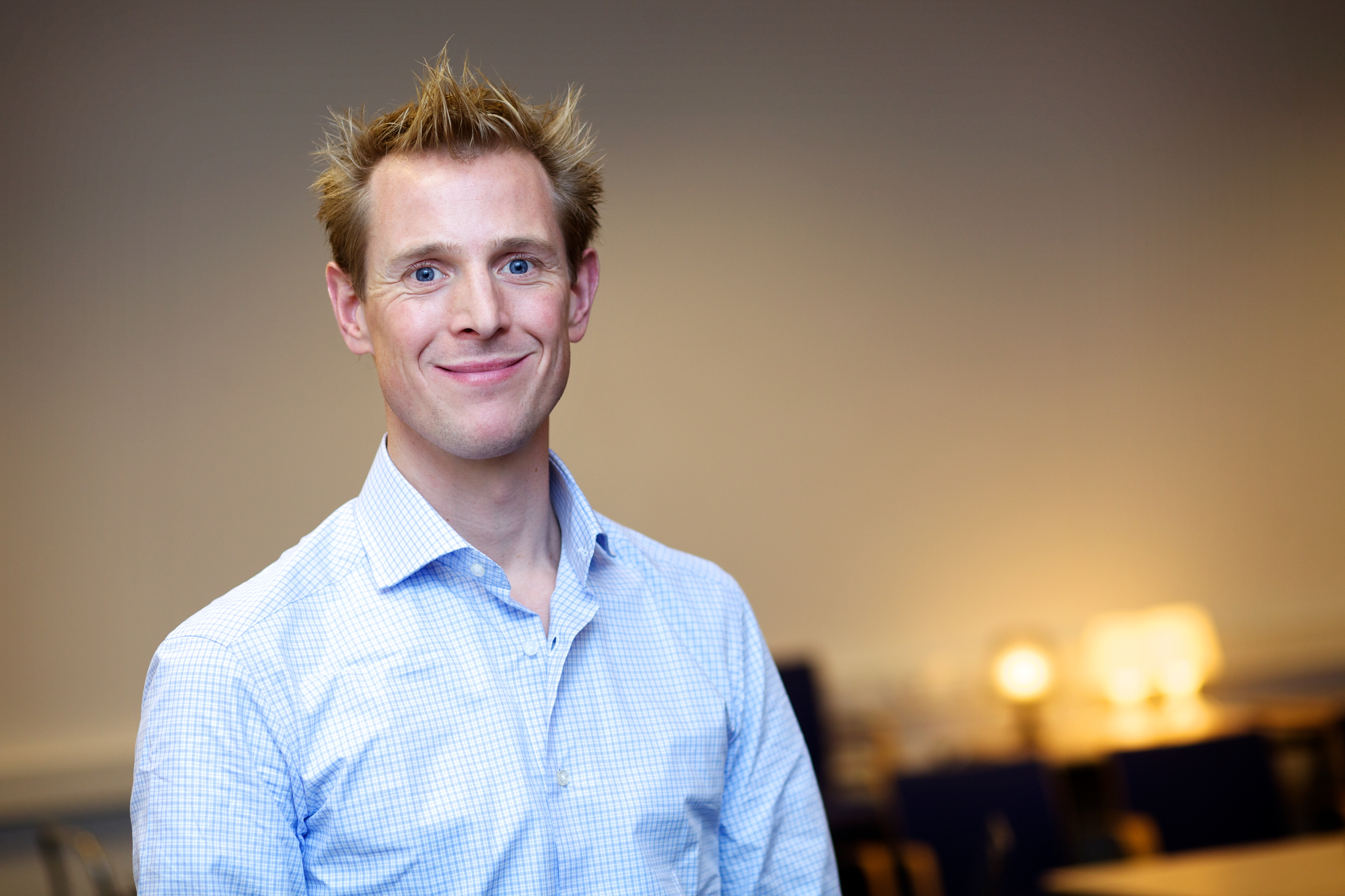 Echt Overvecht heeft tot doel om een positiever licht op deze mooie wijk te laten schijnen. Verschillende partners werken samen aan het imago van Overvecht. Tijdens de partnerbijeenkomst van werd vooruit gekeken naar het komend jaar. Ligt Echt Overvecht op koers en waar kan de samenwerking intensiever? Voormalig schaatser en Olympisch kampioen Jochem Uytdehaage nam de aanwezigen mee op de weg naar resultaten, presteren en teambuilding.